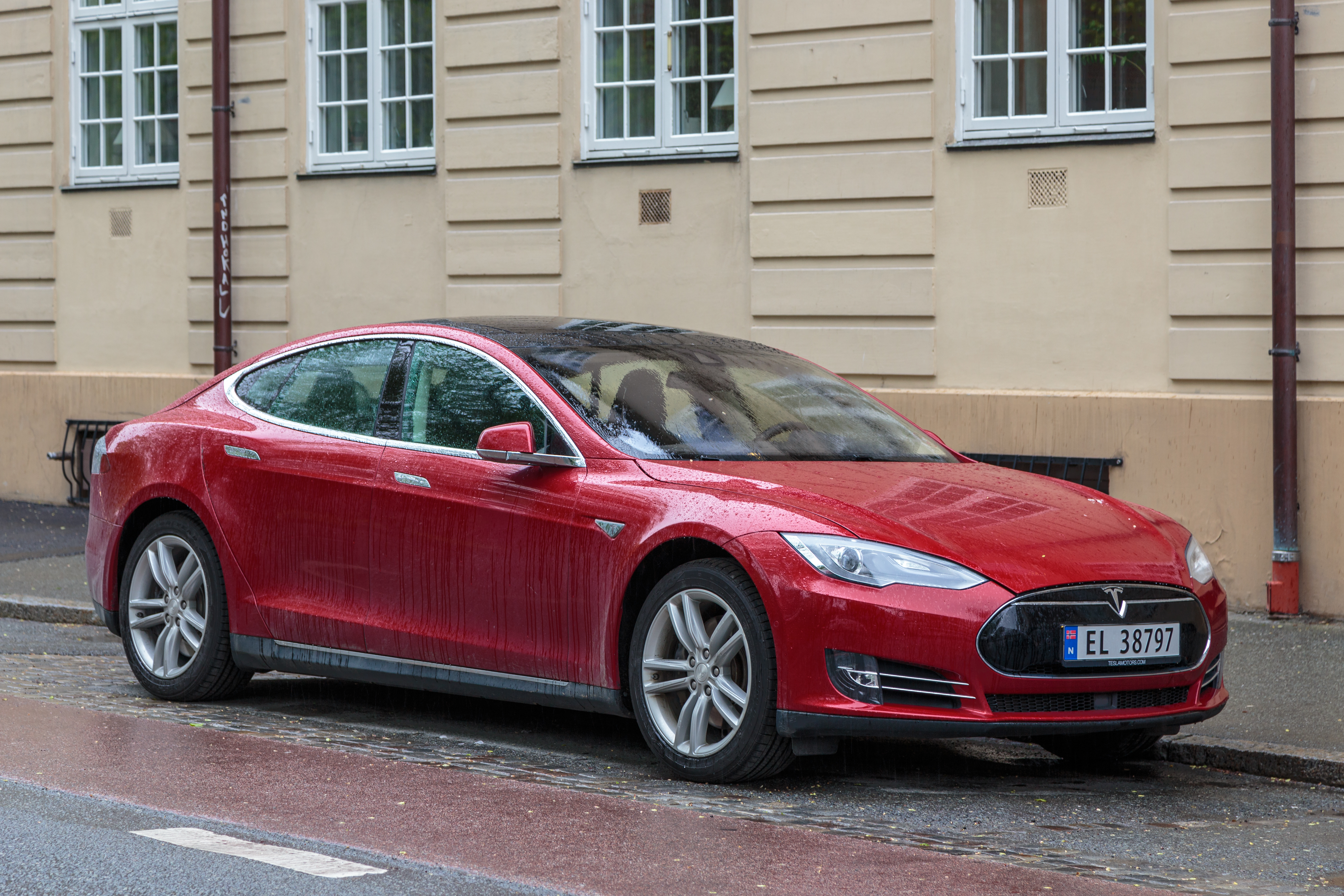 Tesla Model S85